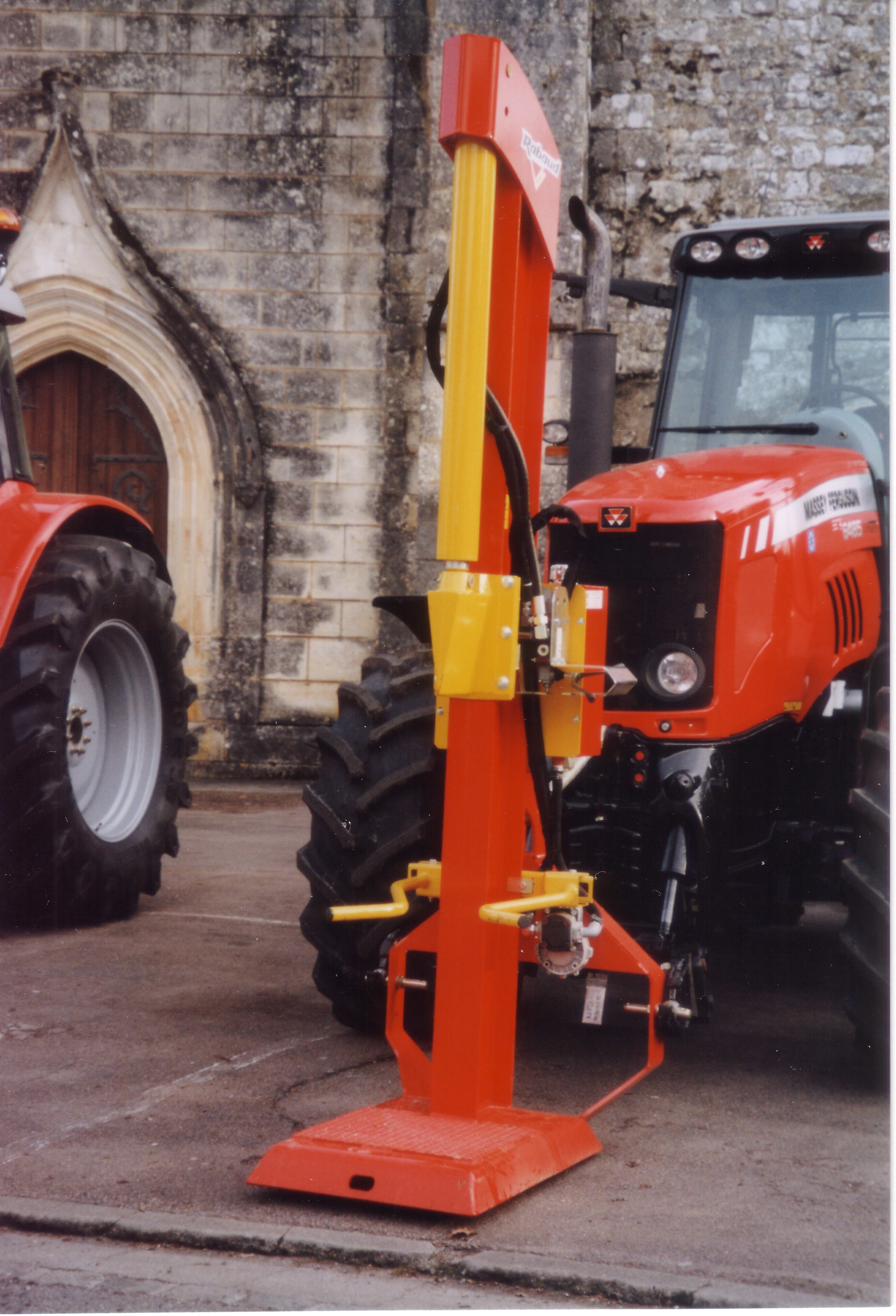 Hydraulischer Holzspalter der Firma Rabaud.